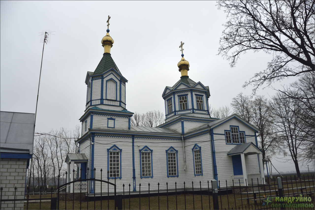 церква (дер.), Дудкин Гай